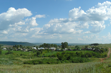 Вид деревни Поповка